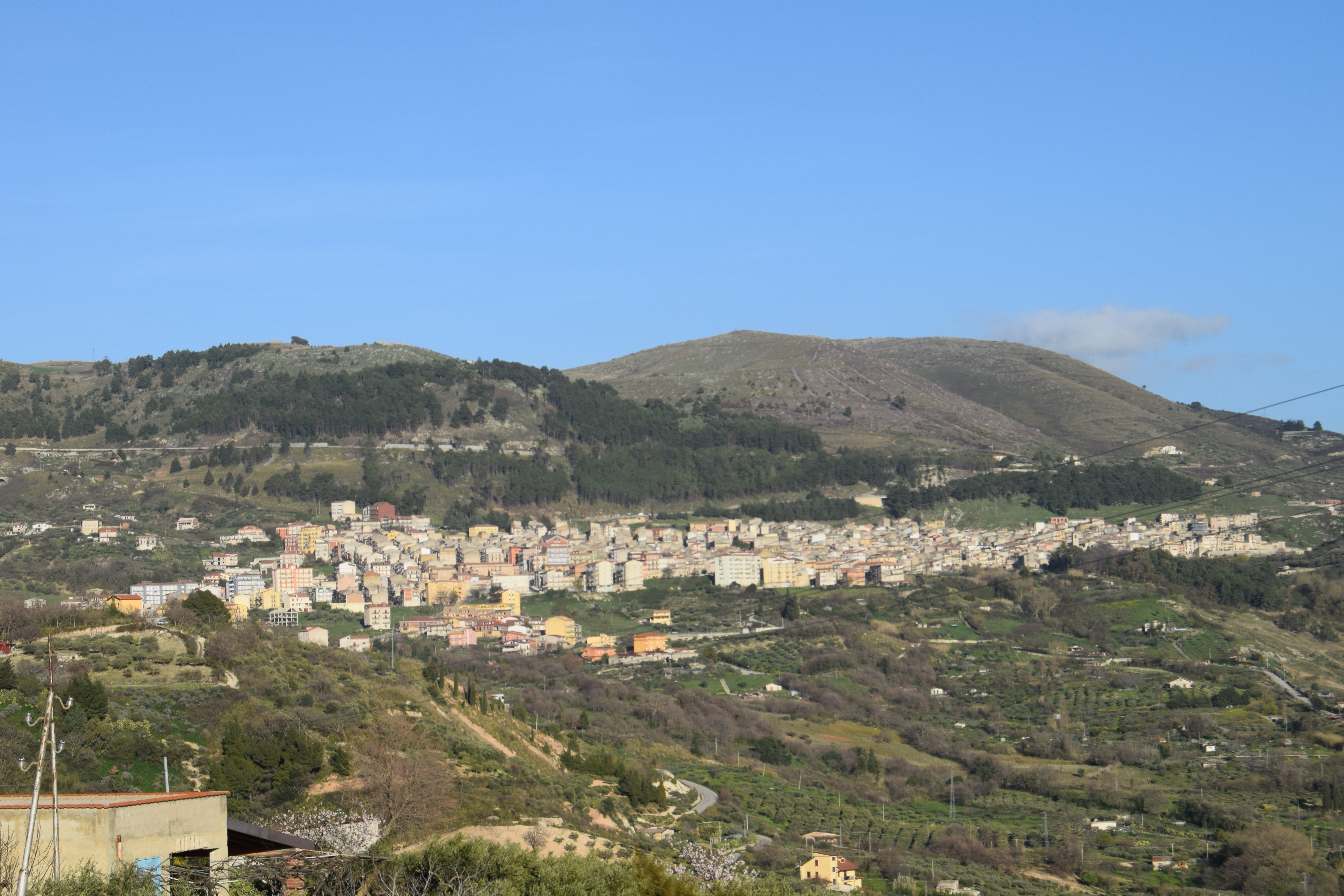 Panorama del centro abitato, comune di Santo Stefano Quisquina (Provincia di Agrigento, Sicilia, Italia)